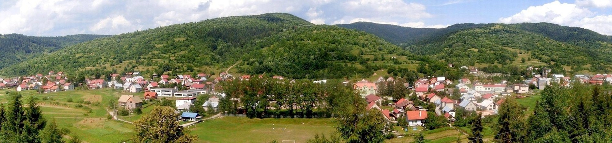 Zborov nad bystiricou Slovakian vilage